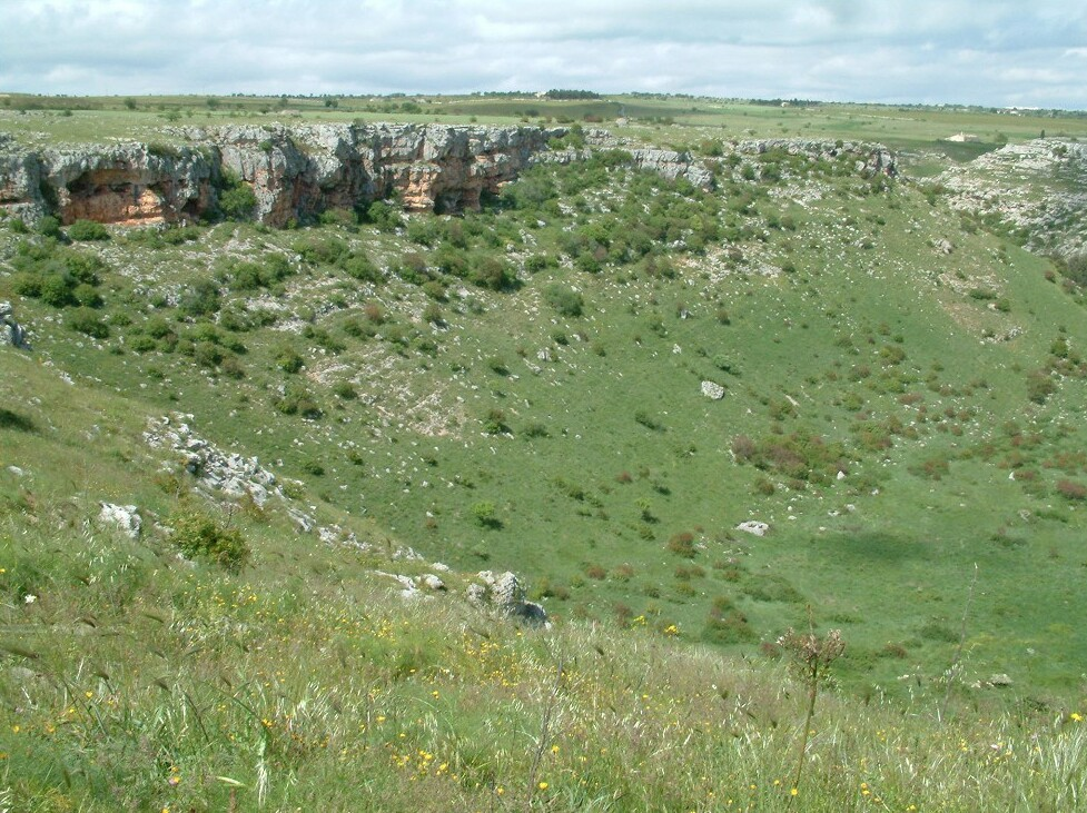 Pulo di Altamura, Italy. Sinkhole -- Doline